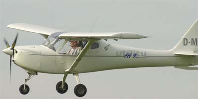 FK9 Mk 3 Utility im Queranflug